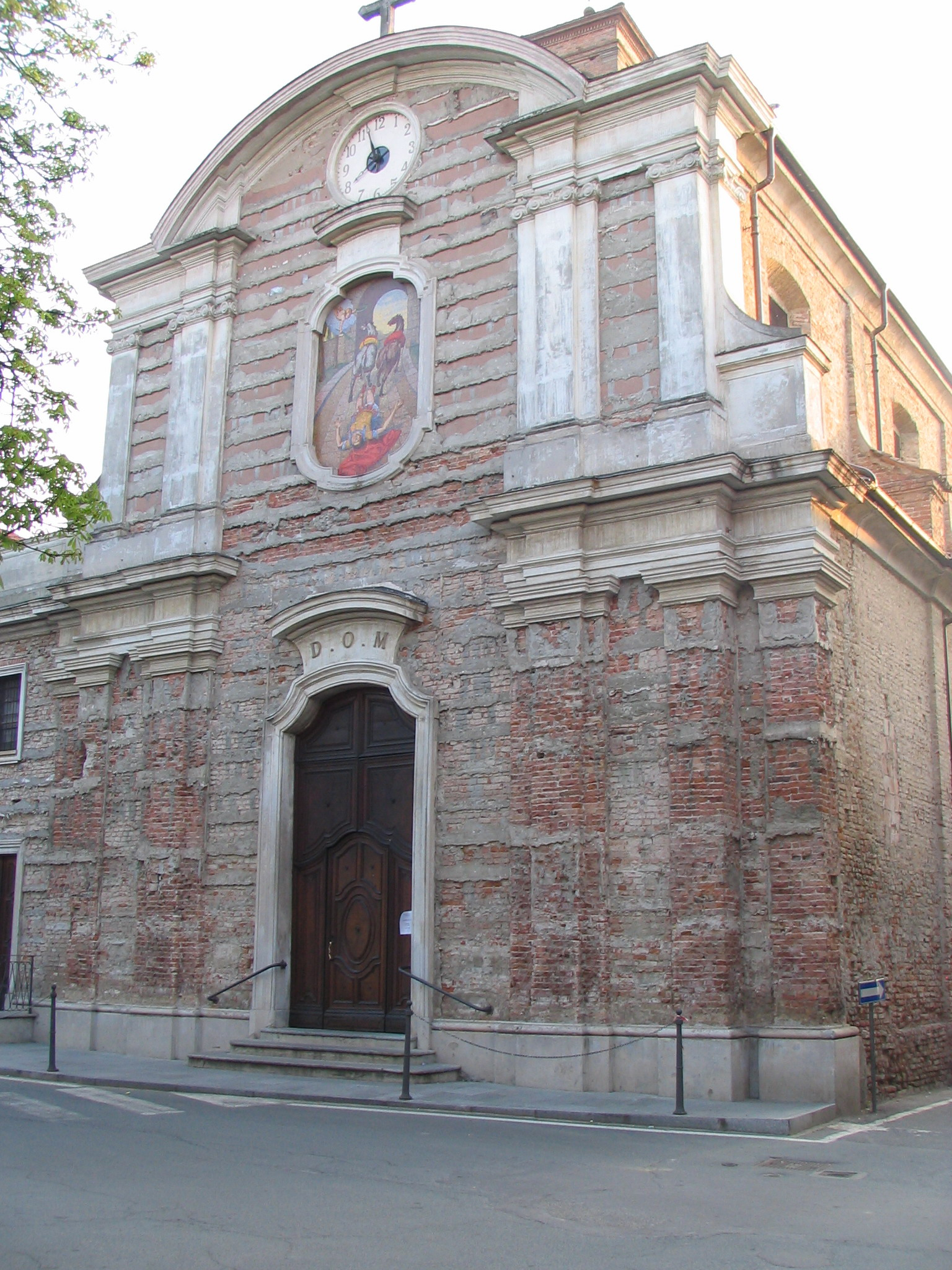 Nizza Monferrato (Asti), San Ippolito church